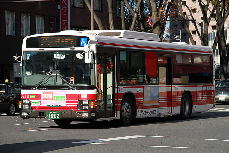 Tachikawa Bus 立川バス